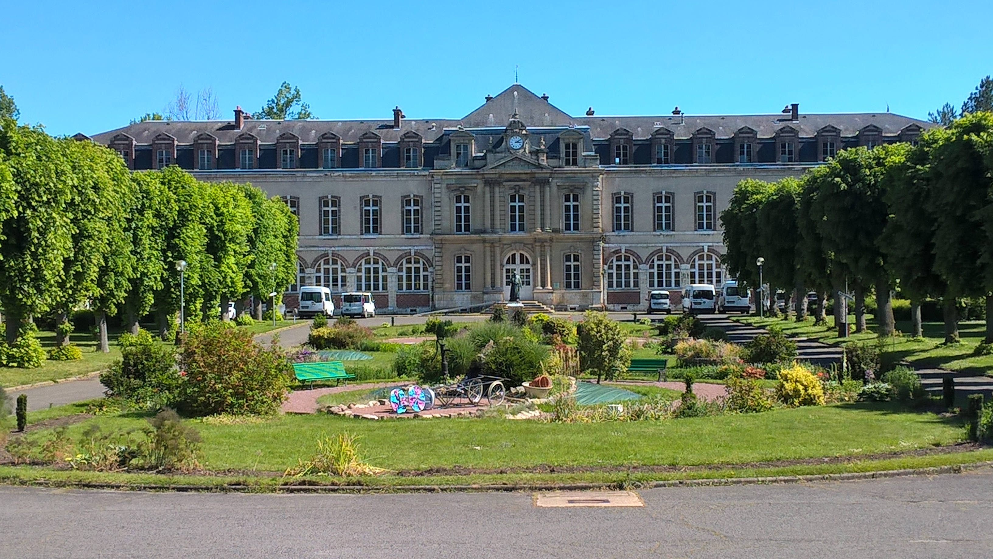 Vue de l'Abbaye Notre-Dame de Josaphat, à Lèves